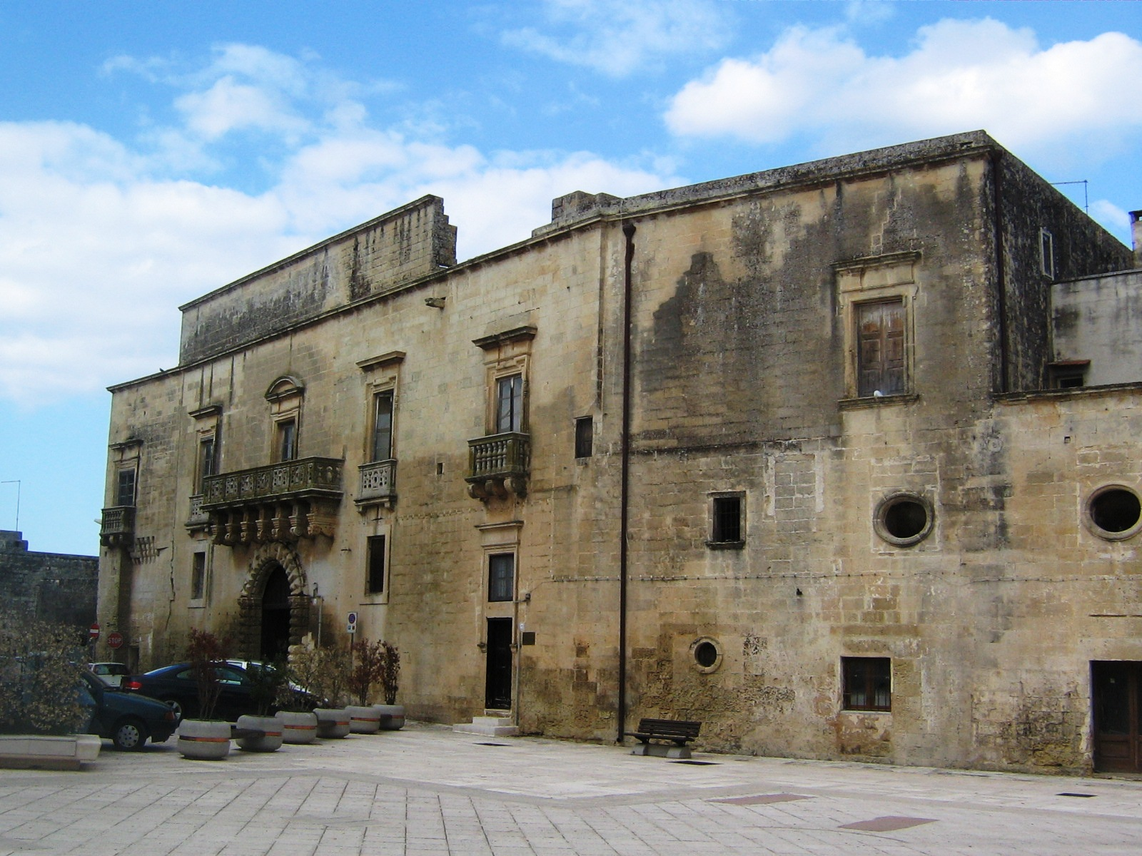 Palazzo Baronale Caprarica di Lecce